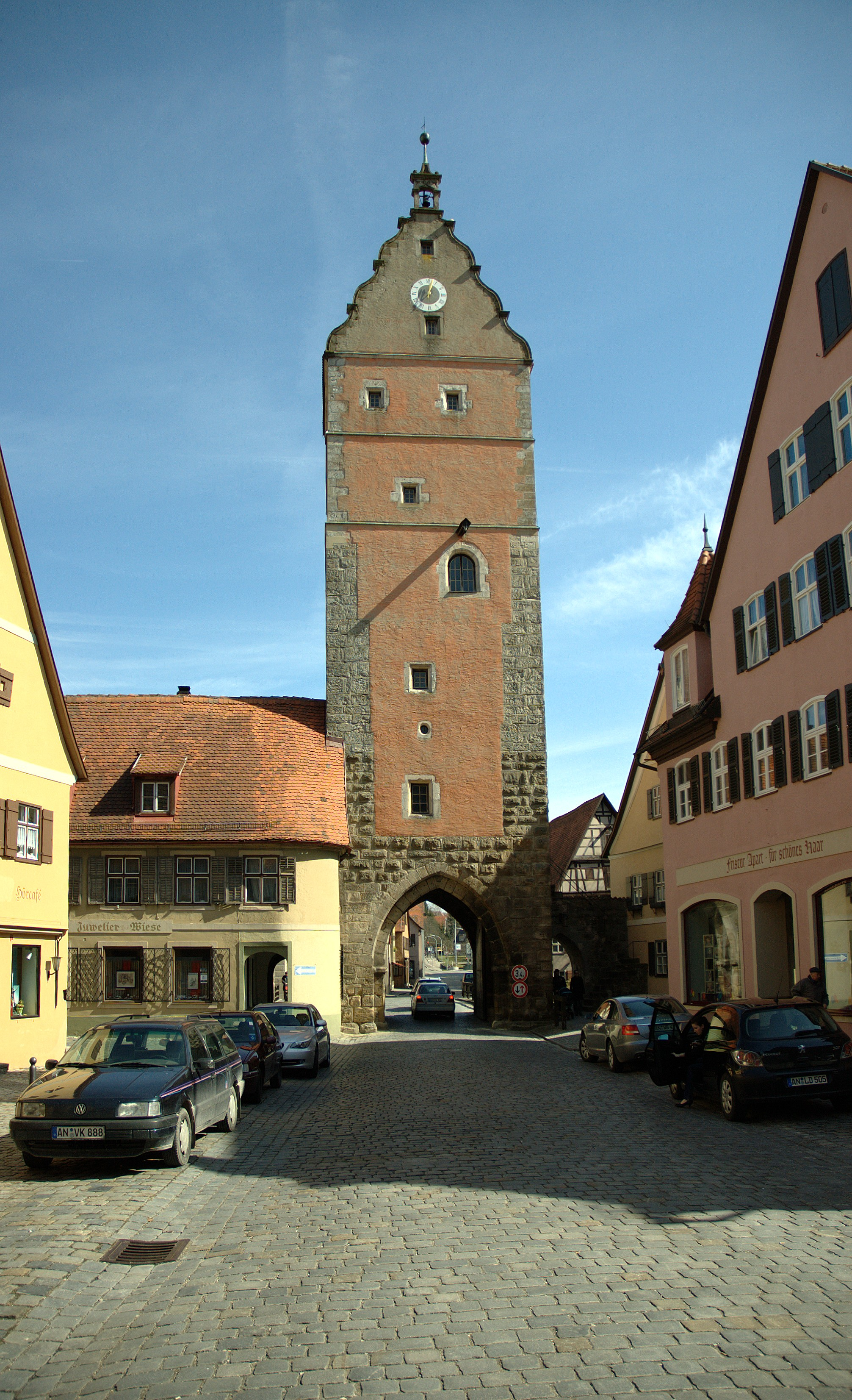 Dinkelsbühl, Wörnitztor